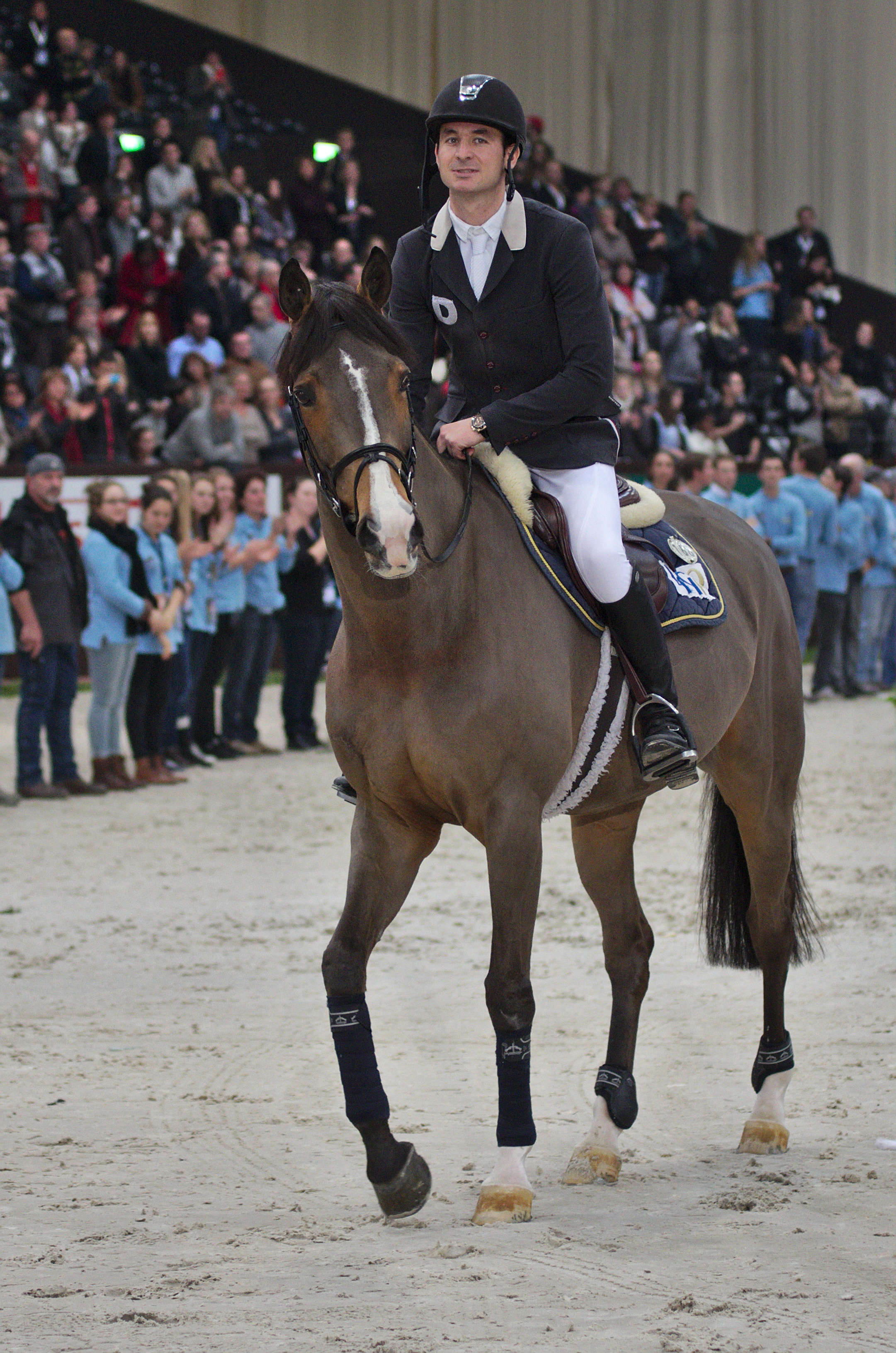 CHI Genève 2013 - 20131214 - Steve Guerdat et Jalisca